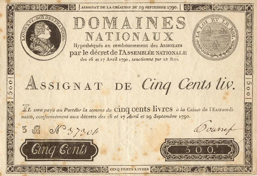 500 Livres 1790 averse = uni